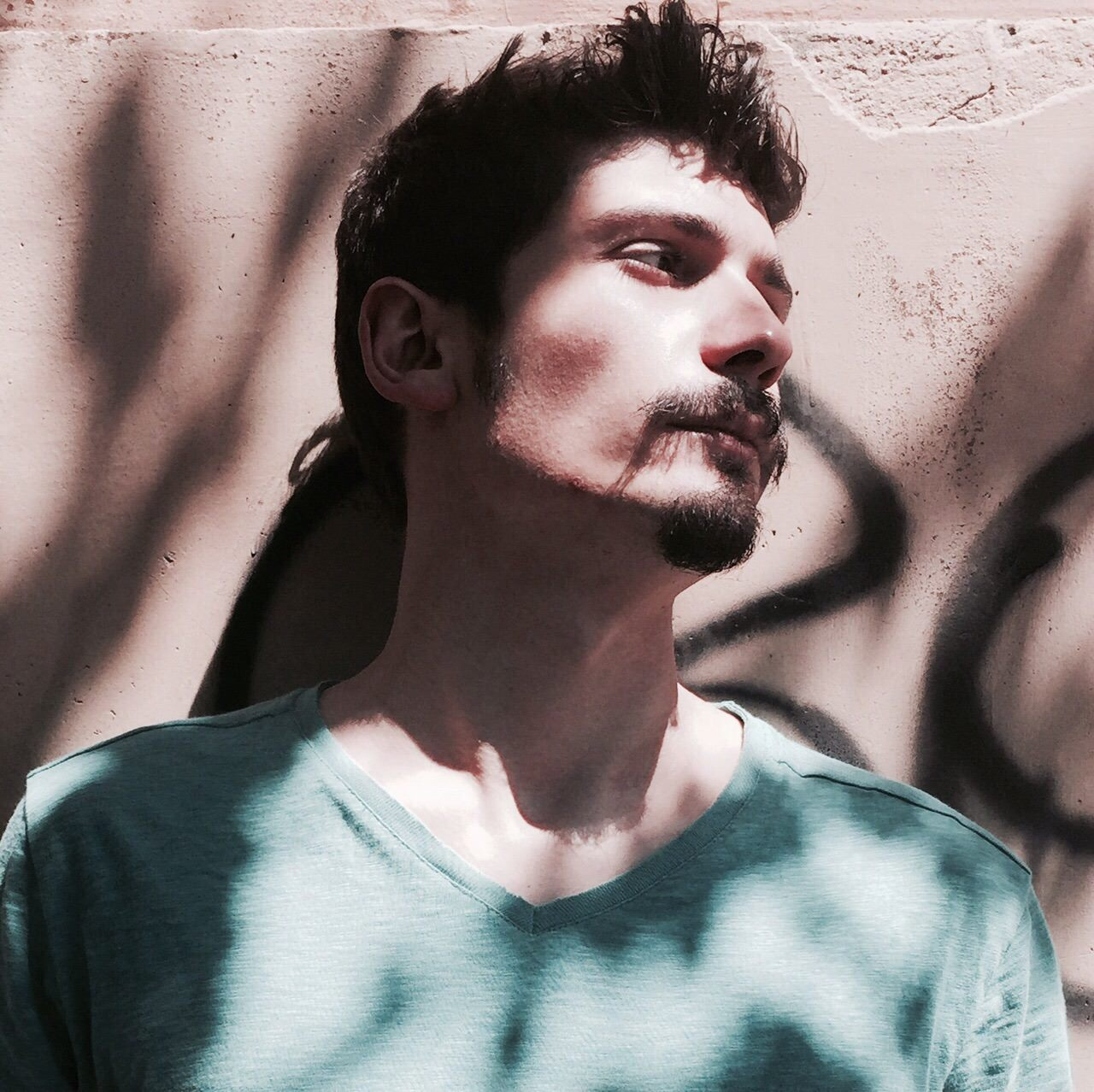 Immagine di profilo della Pagina ufficiale Wikipedia